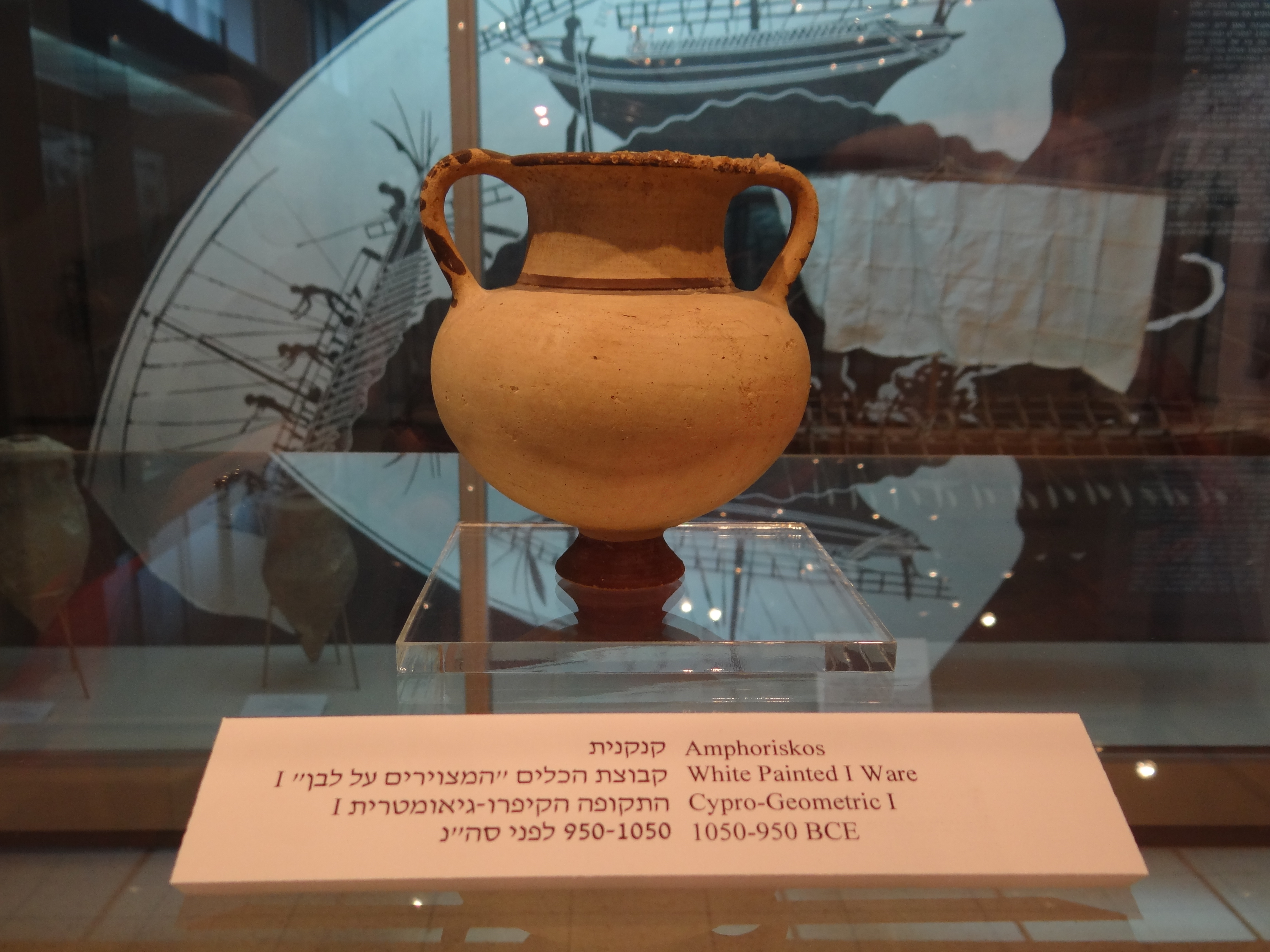 Cypriotic White Painted Ware from Iron Age, Israeli National Maritime Museum, Haifa משפחת כלים "המצויירים על לבן" מתקופת הברזל . כלים אלה נמצאו מחוץ לקפריסין במכלולים מהמאה ה11 וה-10 לפני הספירה אוסף המוזיאון הימי הלאומי קנקנית קבוצת הכלים המצויירים לבן 1